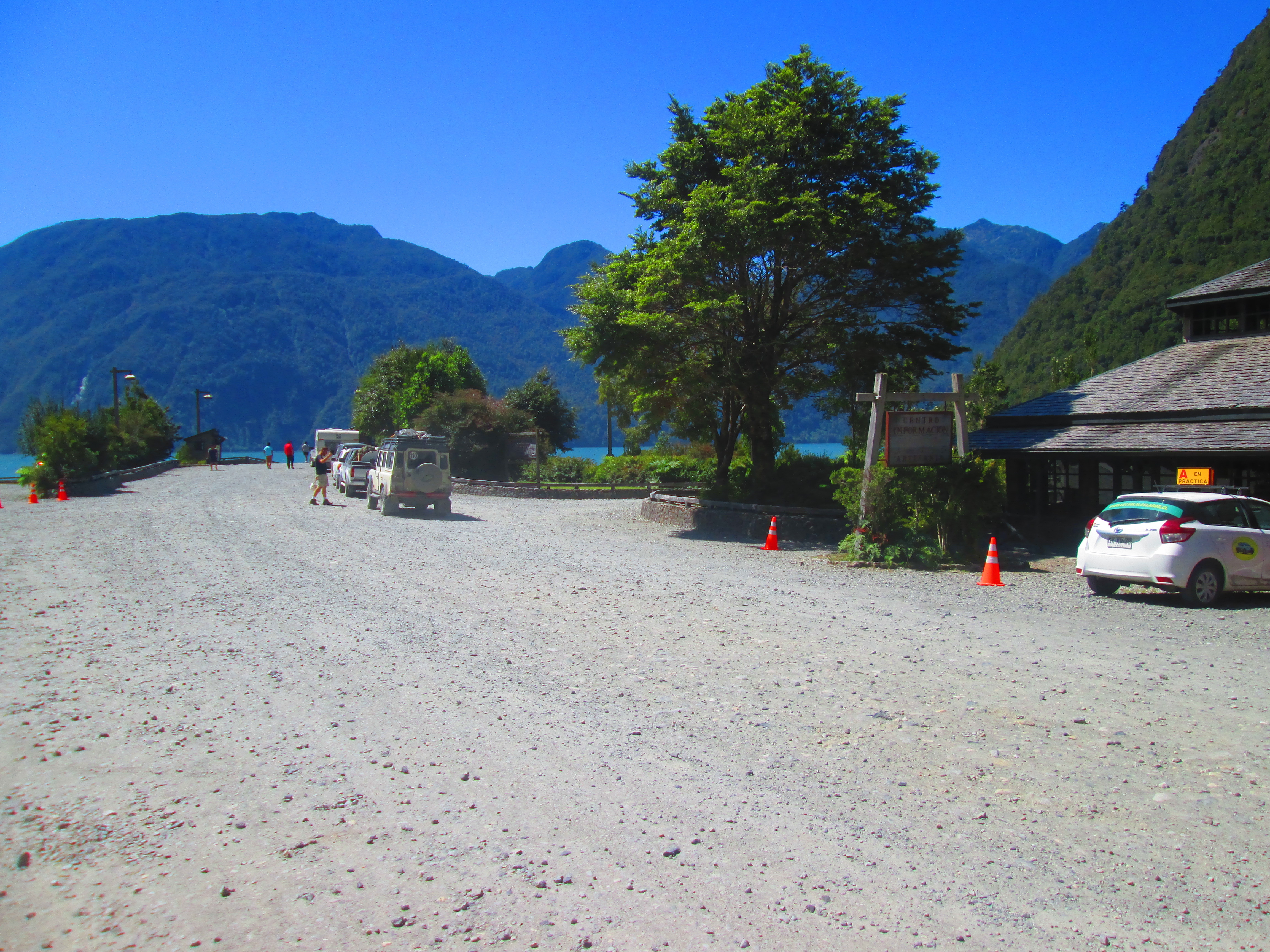 Imagen de la entrada donde arriba la barcaza a Caleta Gonzalo. (Región de Los Lagos, Chile).